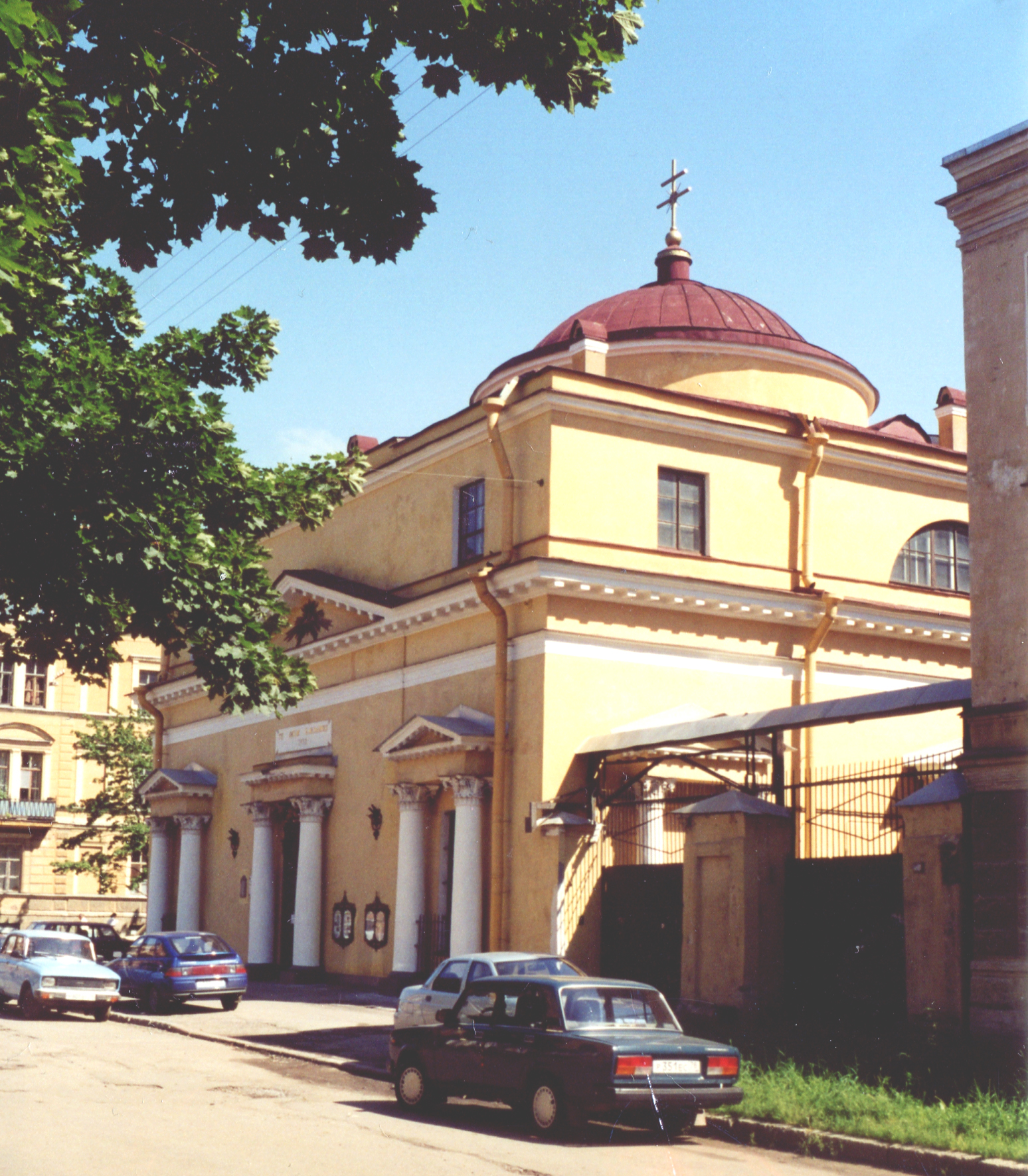 Костёл св.Станислава